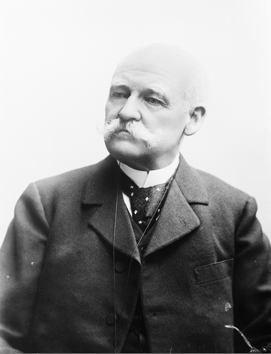 Arkitekten Henrik Thrap-Meyer. Foto: Atelier Rude, ca. 1910. Fra Oslo Museums samling.